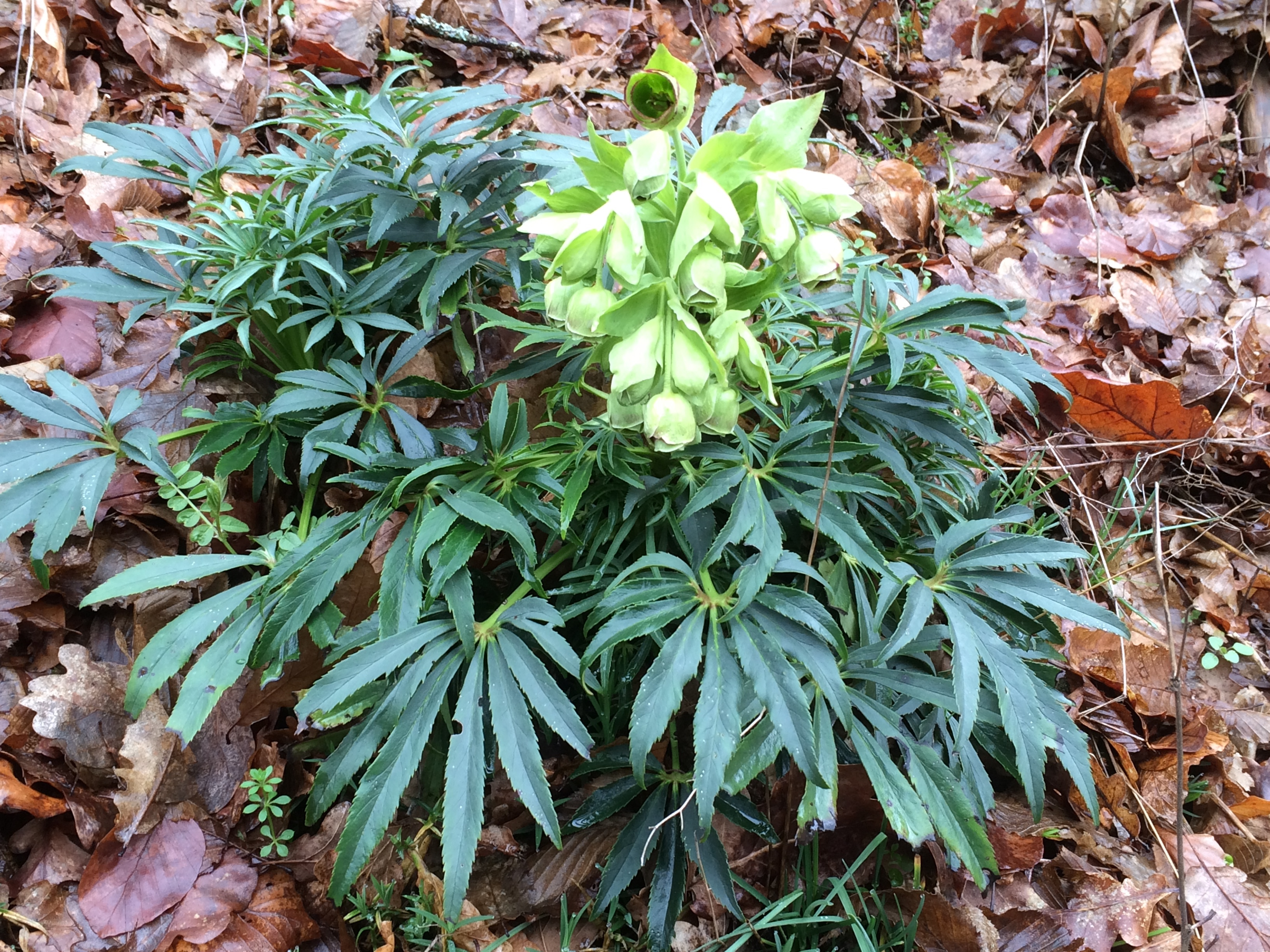 Helleborus foetidus - Bestand entlang der B54 bei Bad Schwalbach (gut sichtbar von der Straße - Parkplatz ausgeschildert); Pflanze ist streng an Kalk gebunden, wird in der Homöopathie genutzt